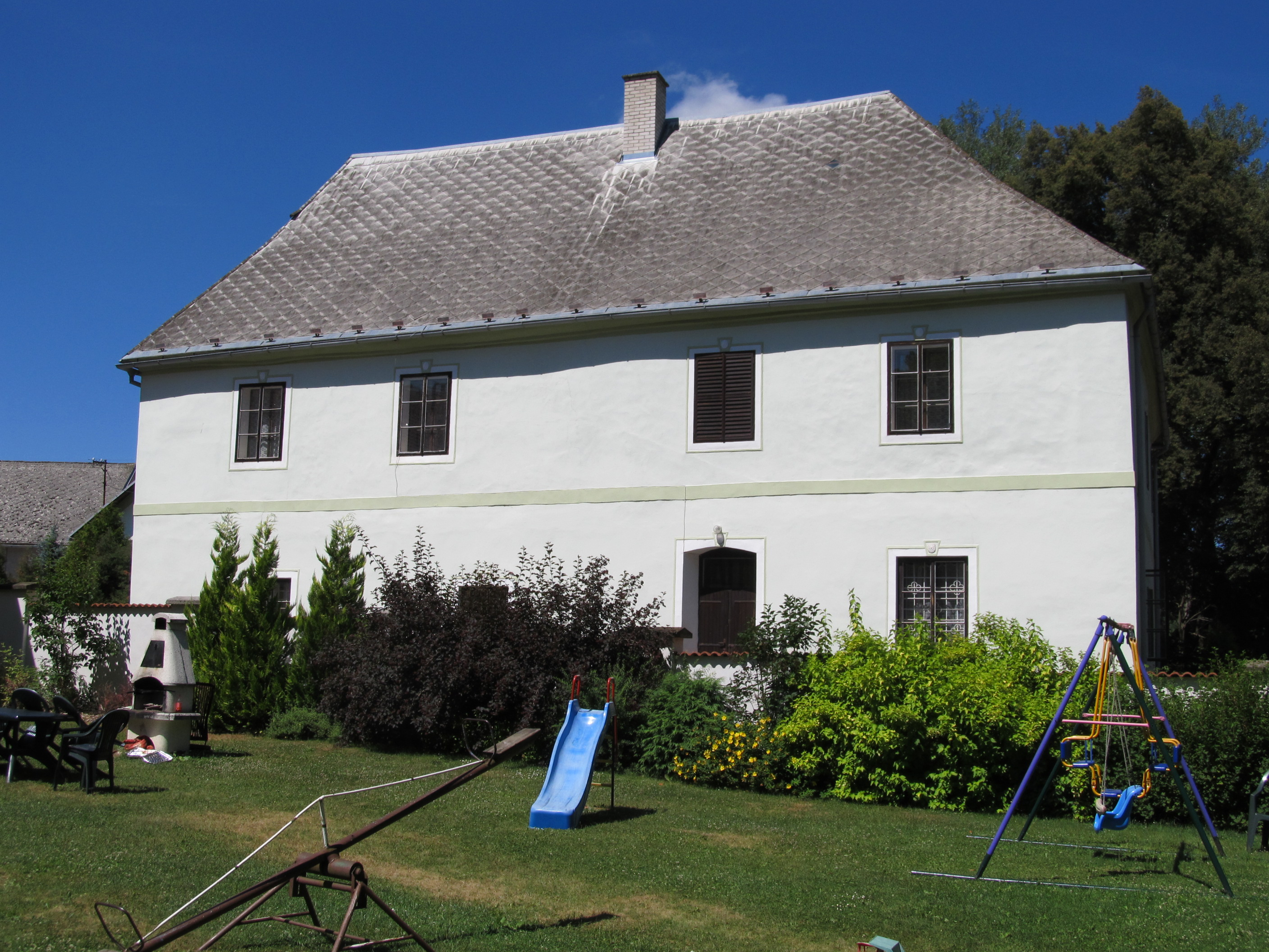 Jindřichovice - tvrz